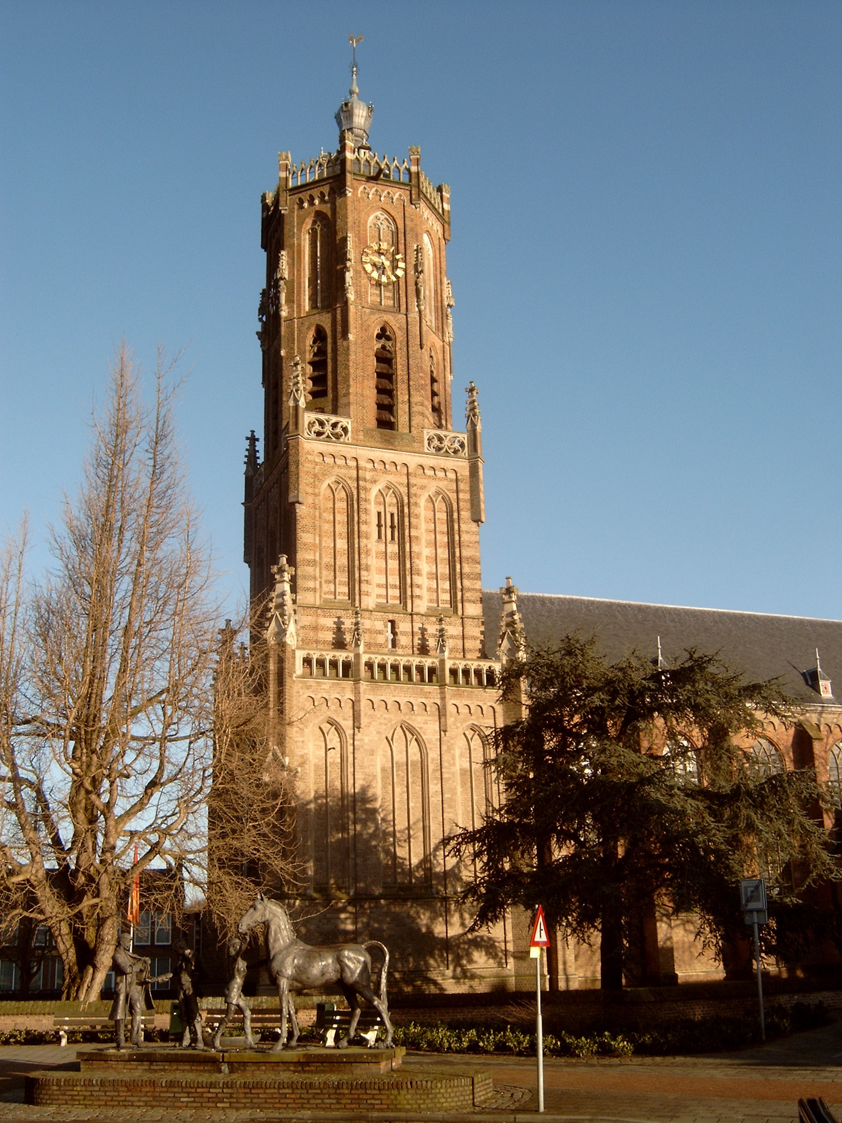 Elst, kerk